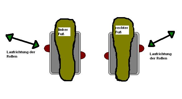 Skizze der Fußstellung zur Laufrollenausrichtung beim Freeline-Skaten